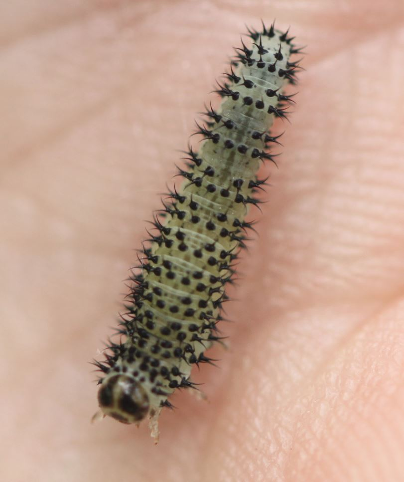 Larve vom Periclista albida am 25. April 2019 in einem Wald nahe Walldorf/Baden